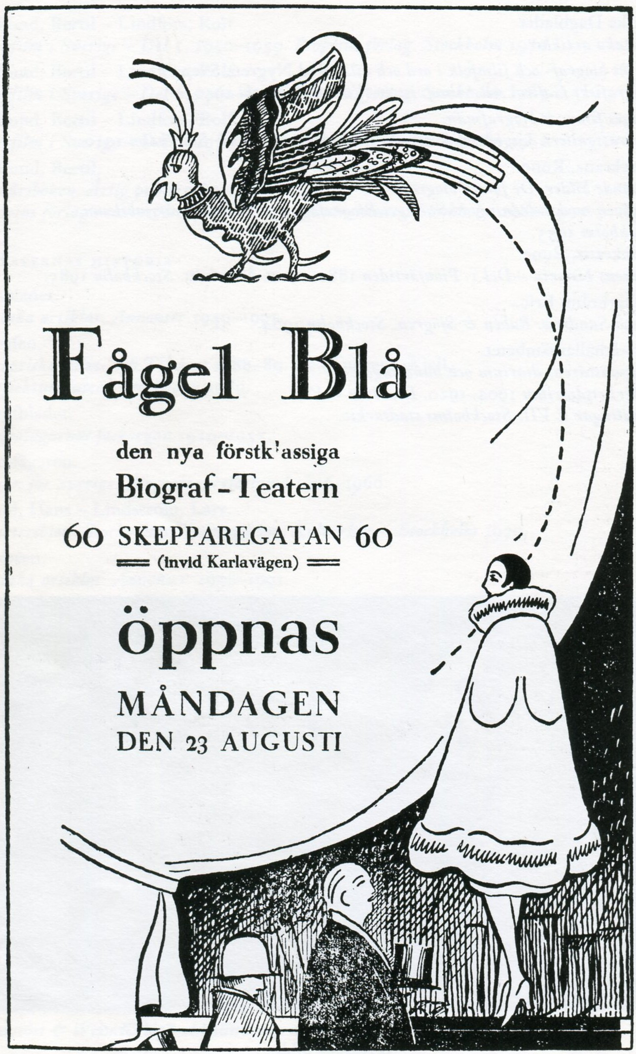 Tidningsannons för biografen "Fågel blå" den 23 augusti 1926